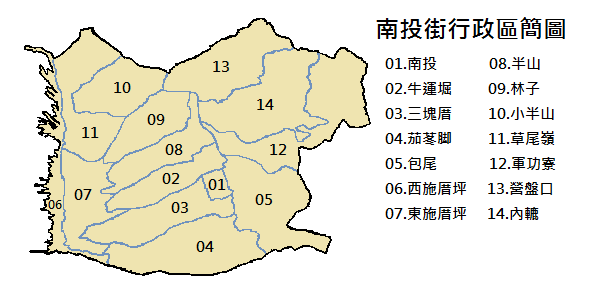 中文（台灣）: 日治時期南投街行政區域地圖